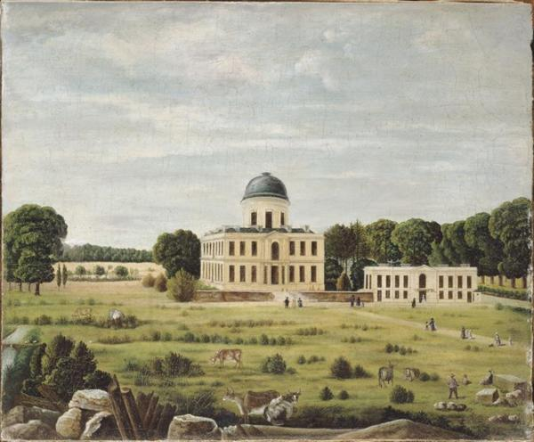 Vue anonyme du château de Navarre, datée du 19ème siècle, détruit en 1836.